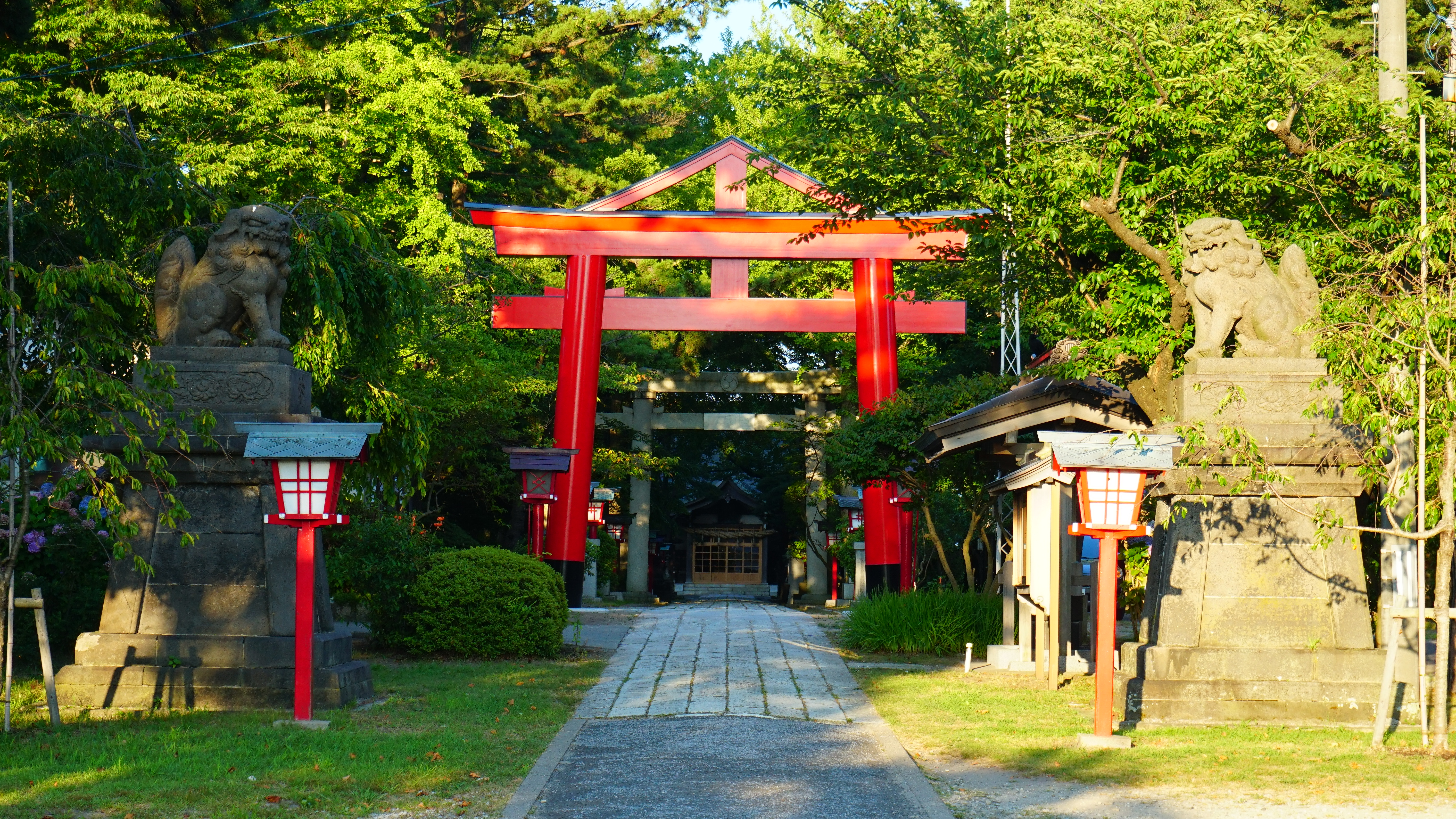 日吉神社（秋田県能代市）の鳥居と参道